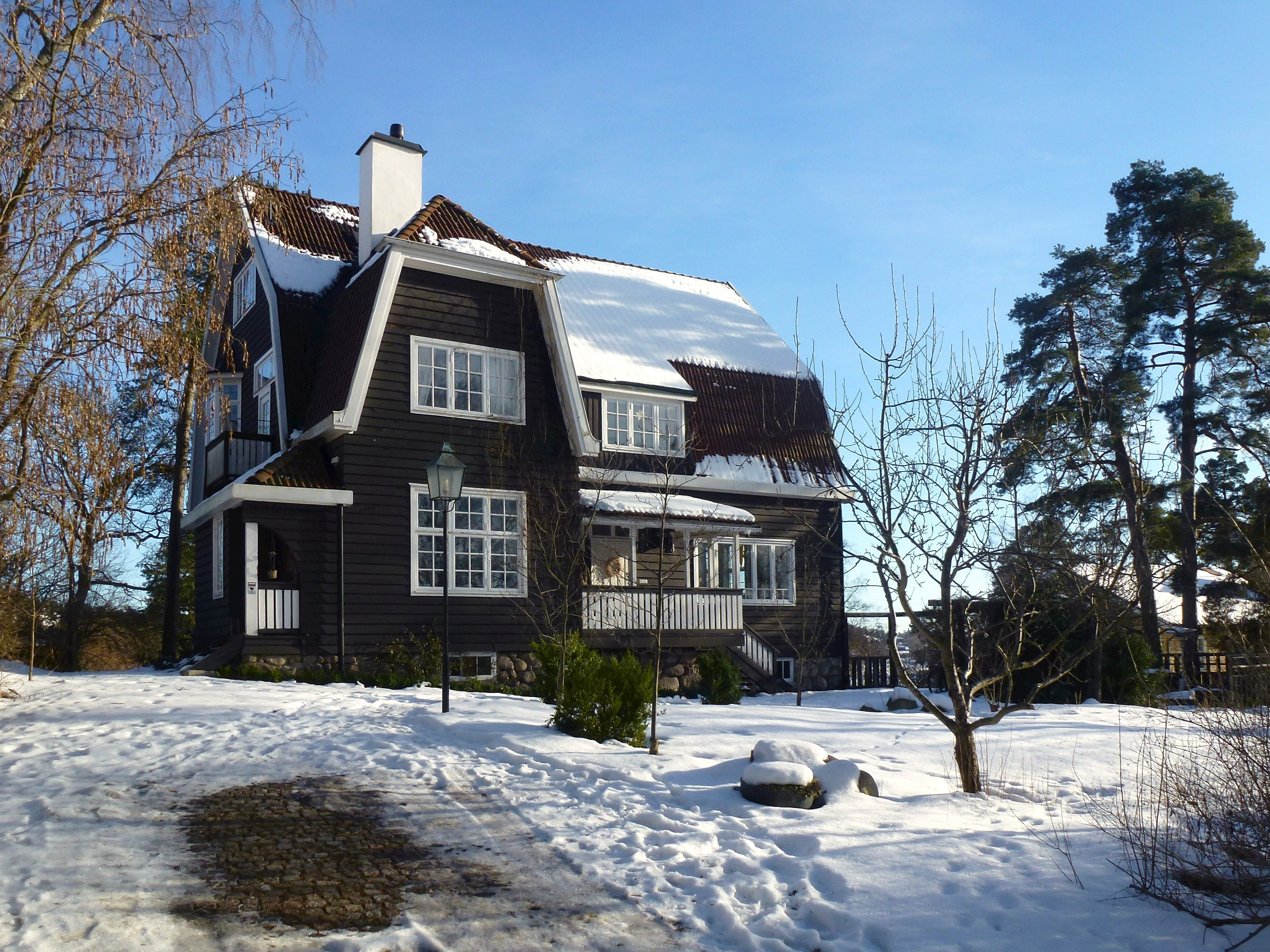 Arkitekt Sigurd Westholms villa i Norrviken, Sollentuna